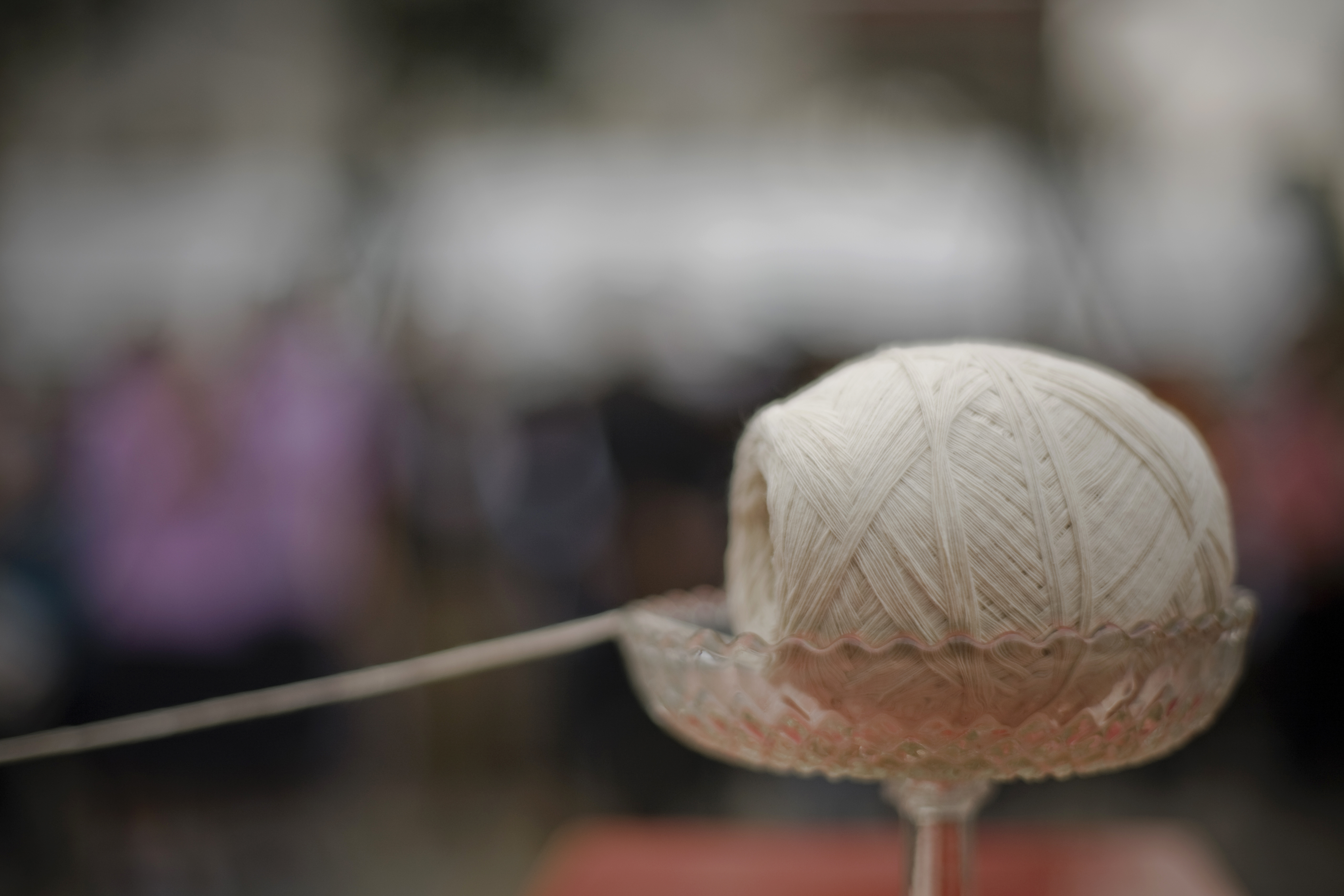 นายกรัฐมนตรี เป็นประธานพิธีเททองหล่อพระประธานเพื่อประดิษฐานในศาลา 100 ปี พระพรหมมังคลาจารย์ (ปัญญานันทภิกขุ) ณ มณฑลพิธีข้างอุโบสถ วัดชลประทานรังสฤษฎ์ ตำบลปากเกร็ด อำเภอปากเกร็ด จังหวัดนนทบุรี วันเสาร์ที่ 19 กุมภาพันธ์ พ.ศ.2554 (Photographer attached to the Prime Minister of the Kingdom of Thailand (H.E.Mr.Abhisit Vejjajiva) : Peerapat Wimolrungkarat / พีรพัฒน์ วิมลรังครัตน์) @is50mm